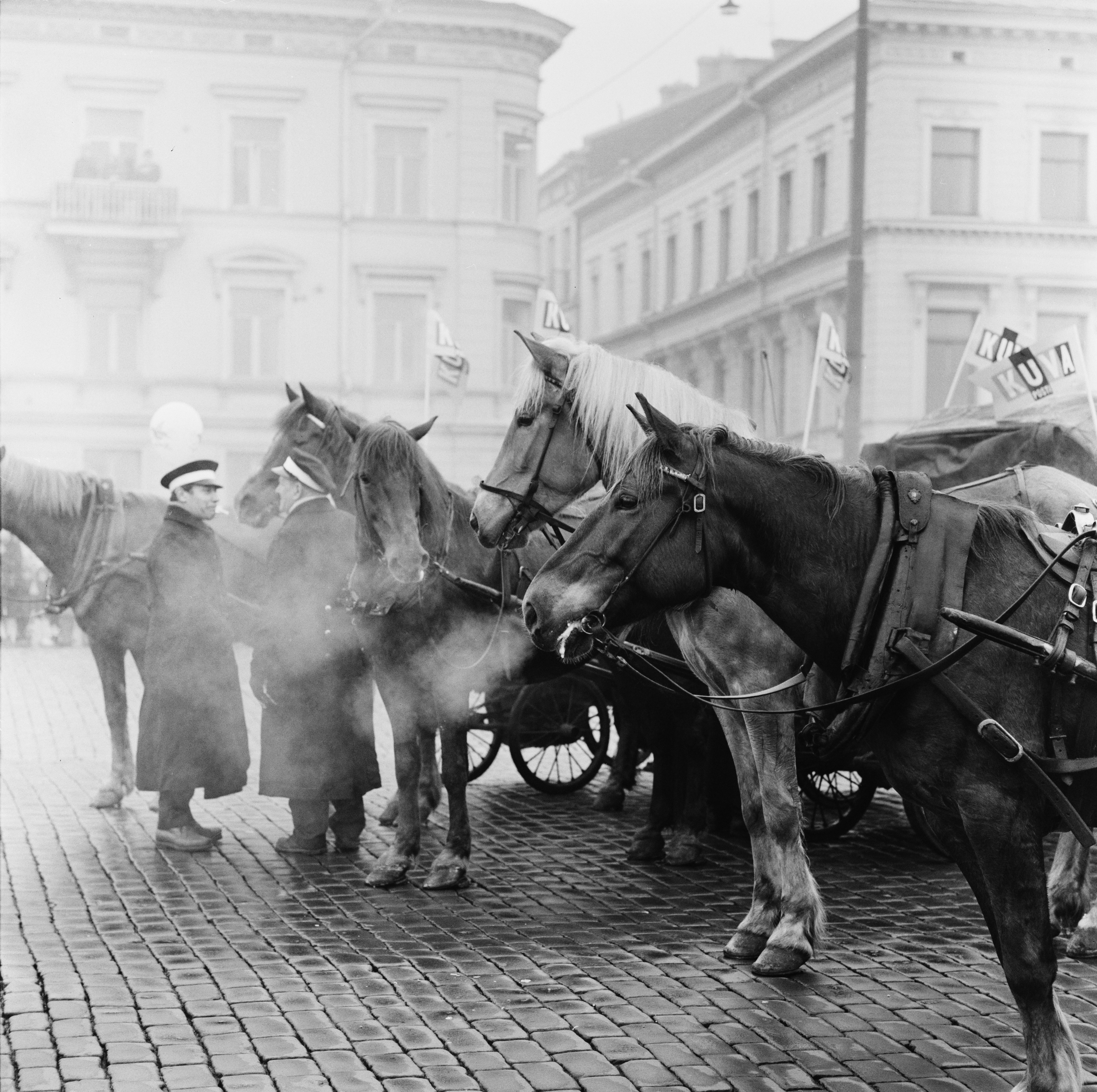 Vossikoita Kauppatorilla vapunpäivänä.; negatiivi, filmi, mv